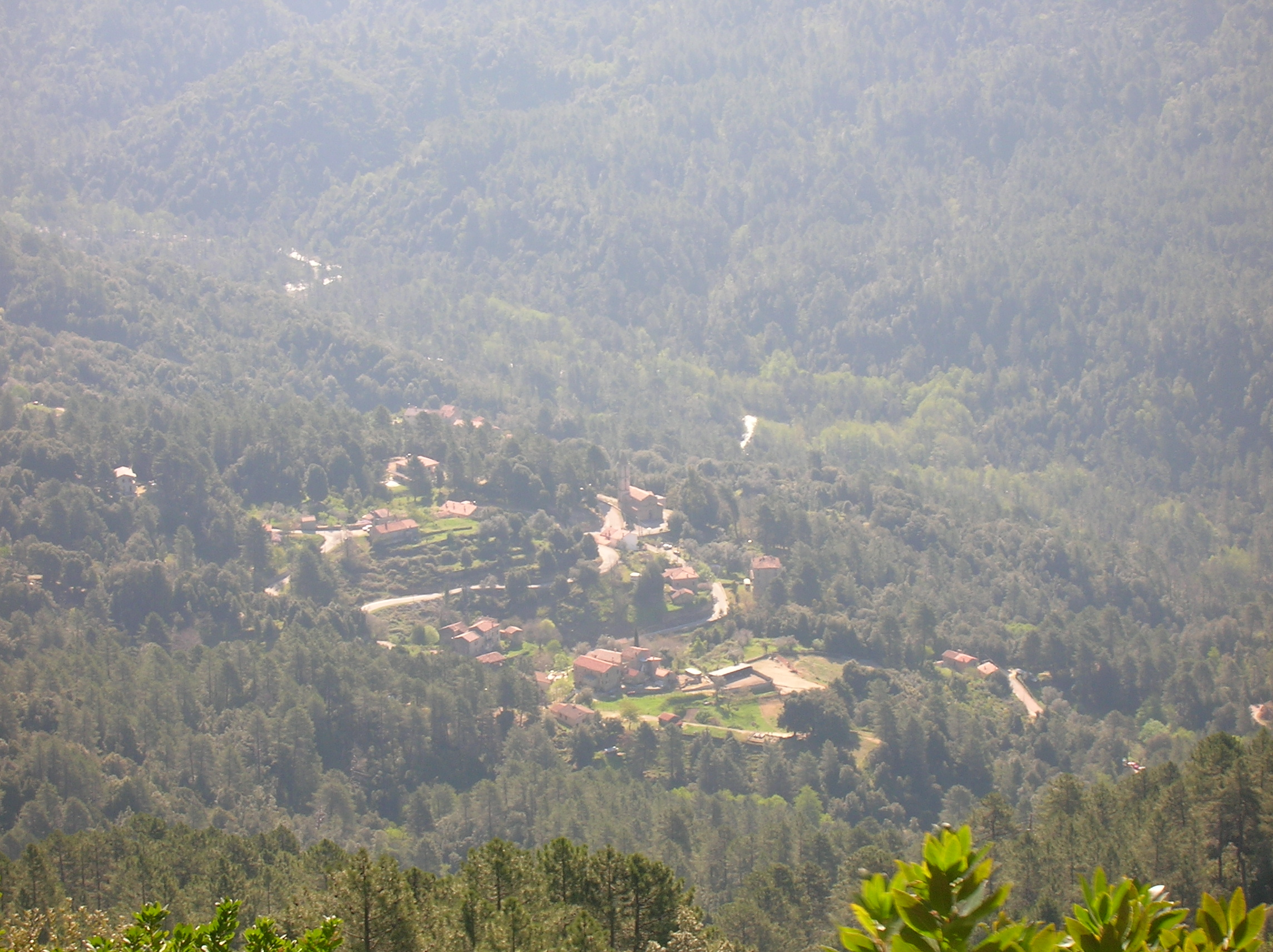 Village de Rezza vu depuis le sentier montant à la Salincaccia (photographie prise vers le Sud)